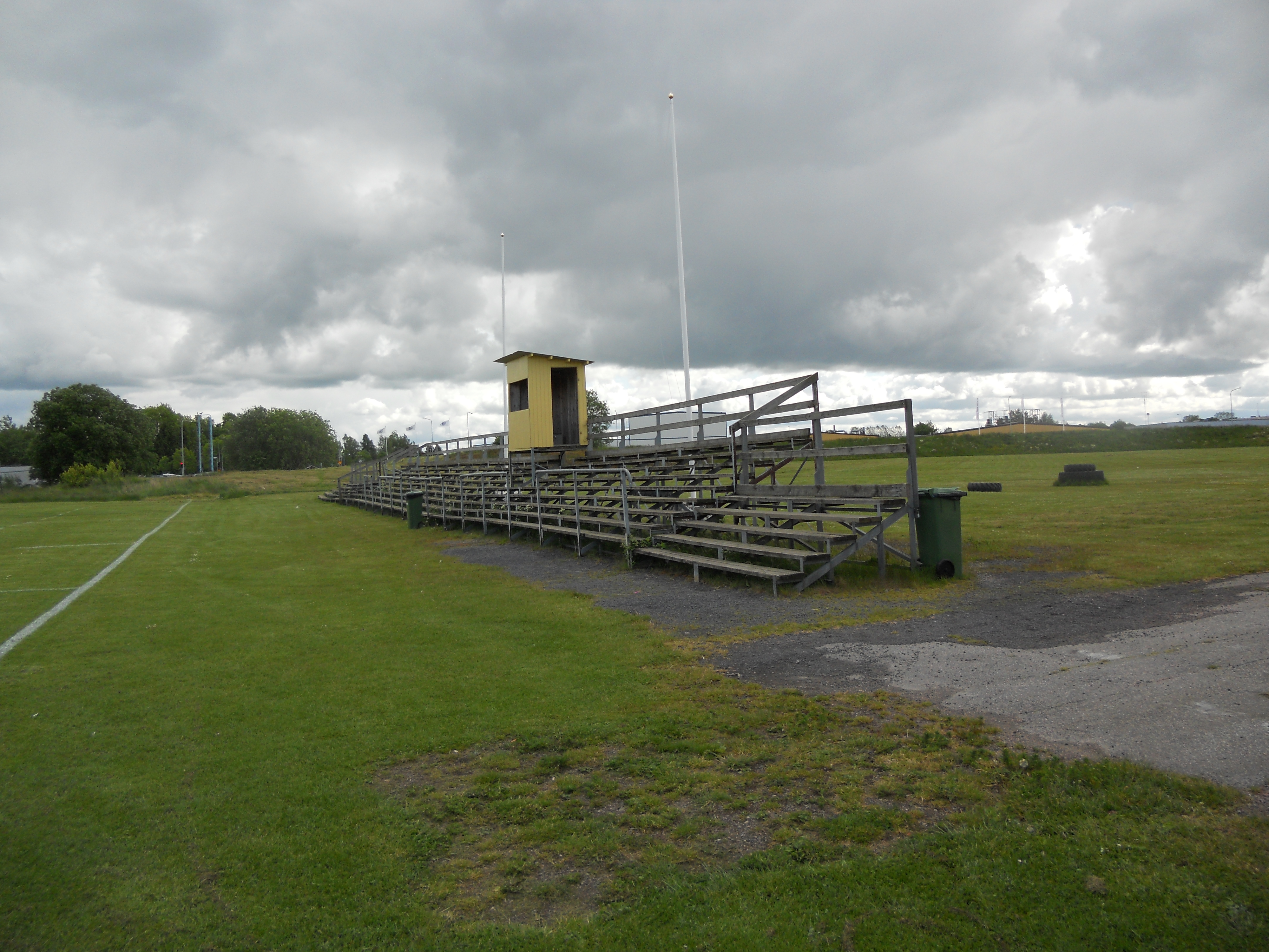 Läktare vid rugbyplanen i Vänersborg.